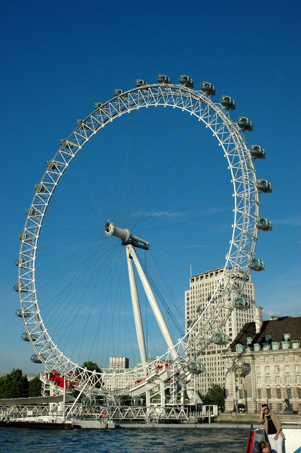 世界最巨大的摩天輪英航倫敦眼 英航倫敦眼（British Airways London Eye）完工於1999年，自從開始矗立在倫敦泰晤士河畔起，就一直是世界第一高的摩天輪類設施，高達135公尺的巨輪，採用首創的觀景式摩天輪（Observation Wheel）設計，以複雜的機械結構自動調整懸掛在巨輪外側的座艙水平。 本照片是由上傳者User:SElephant於2005年9月間拍攝。